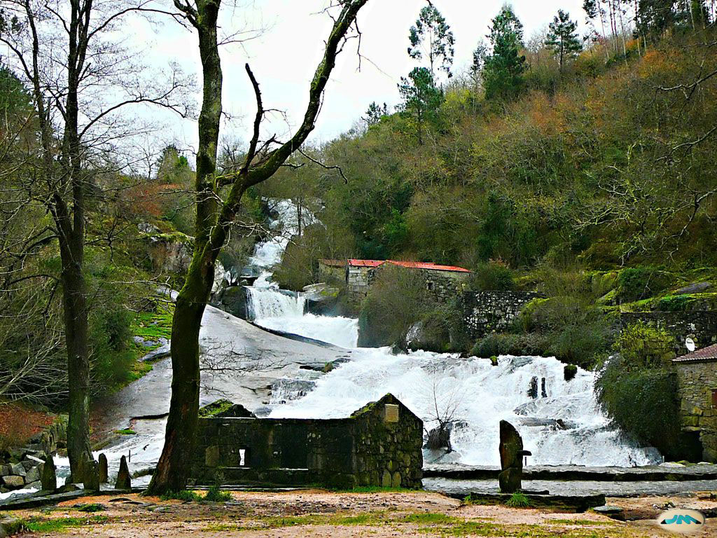 Barro-Río Barosa, Galicia (Spain)